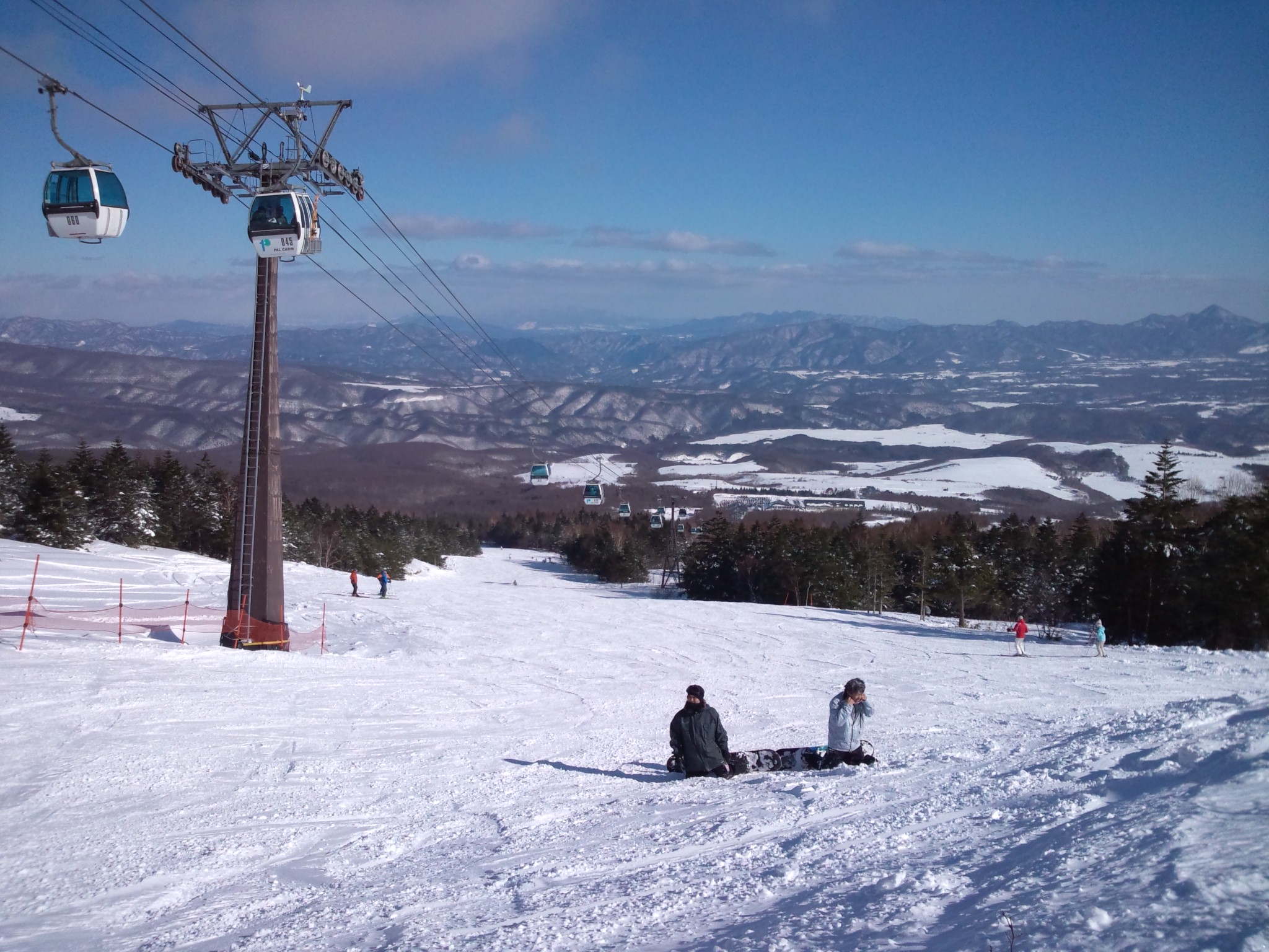 パルコール嬬恋スキーリゾートのゴンドラパルキャビン 私のスマートフォン F-12Cにて撮影